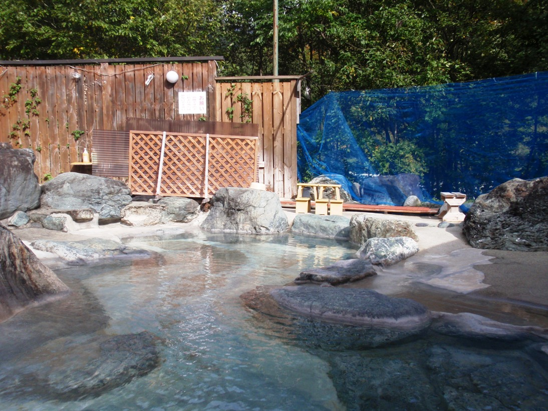 長野県白馬村、白馬八方温泉、おびなたの湯